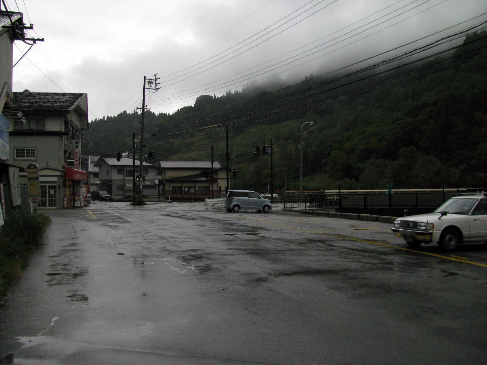 JR大糸線南小谷駅